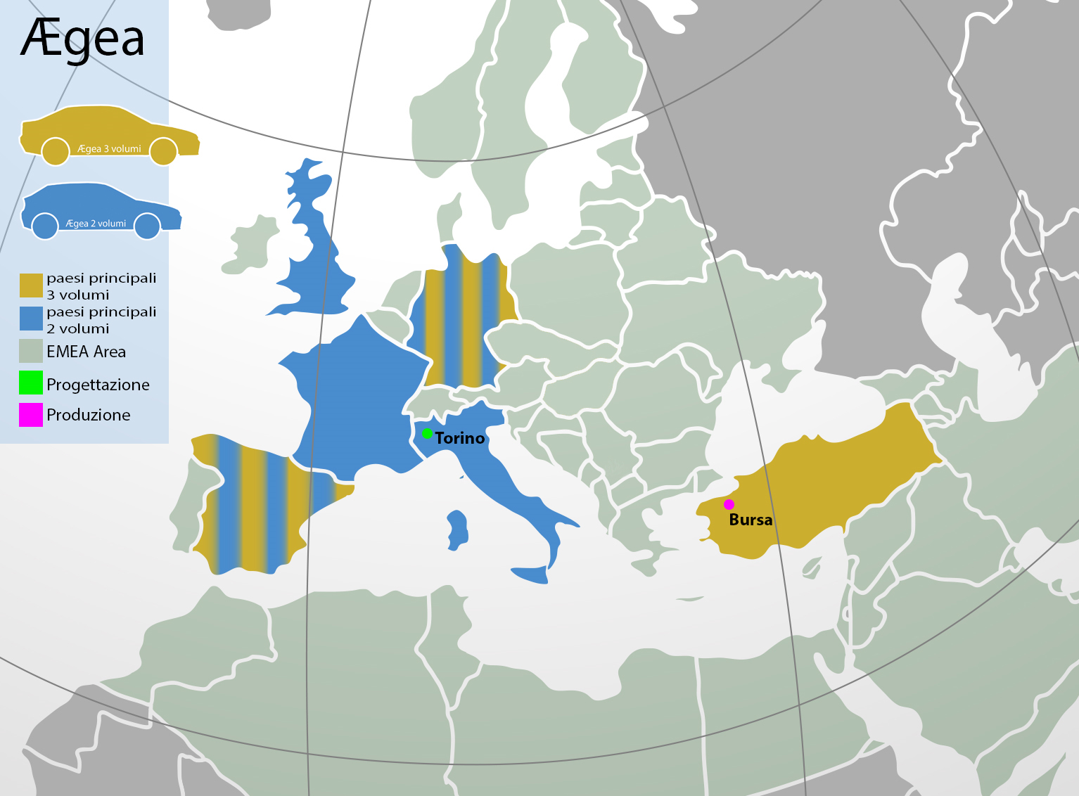 i principali mercati di riferimento EMEA per FIAT. Con evidenziati quelli che si distinguono per preferenza di berline compatte 3 volumi (in giallo) e berline compatte due volumi (in blu)